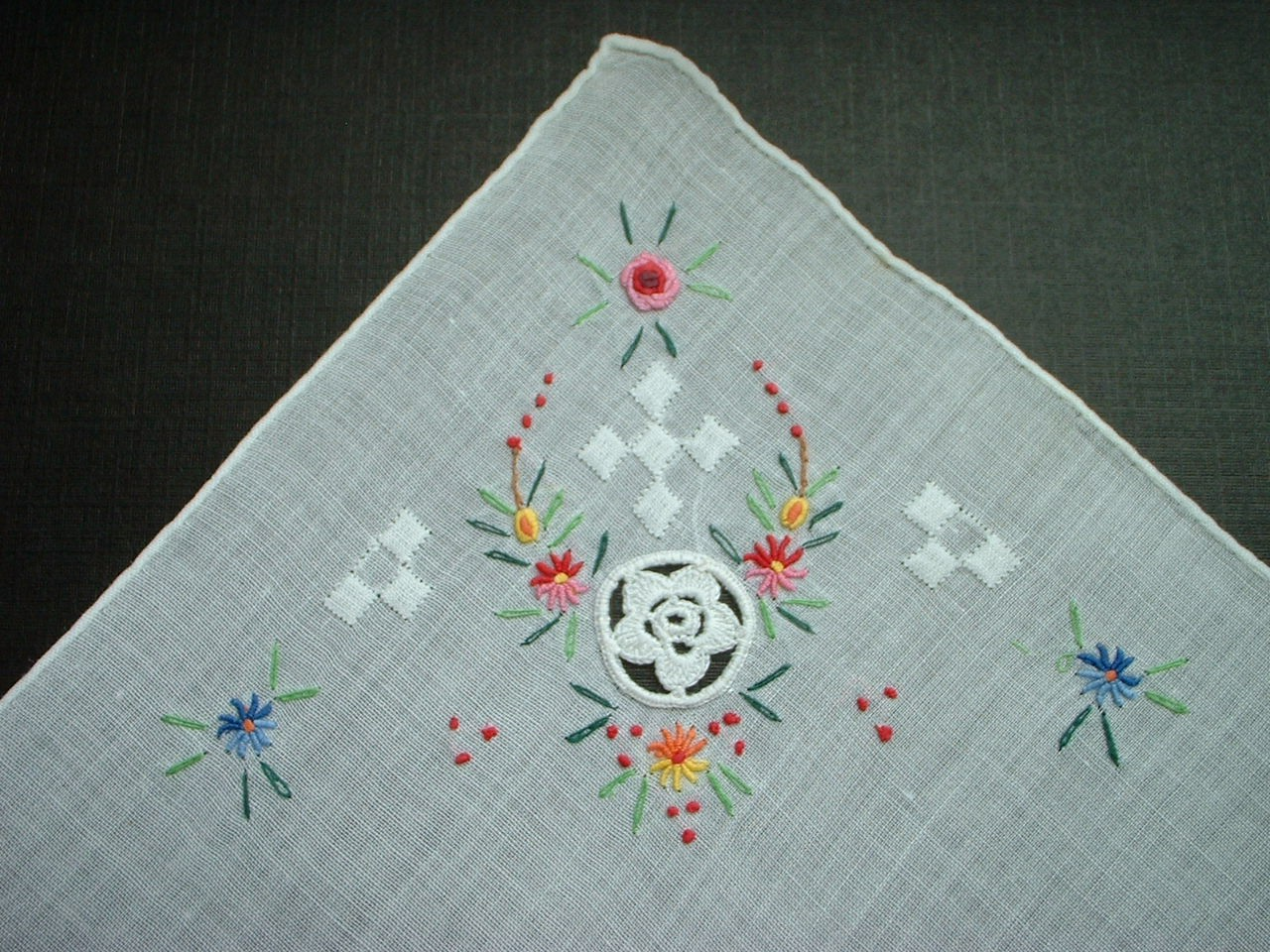 Stickerei auf Batist